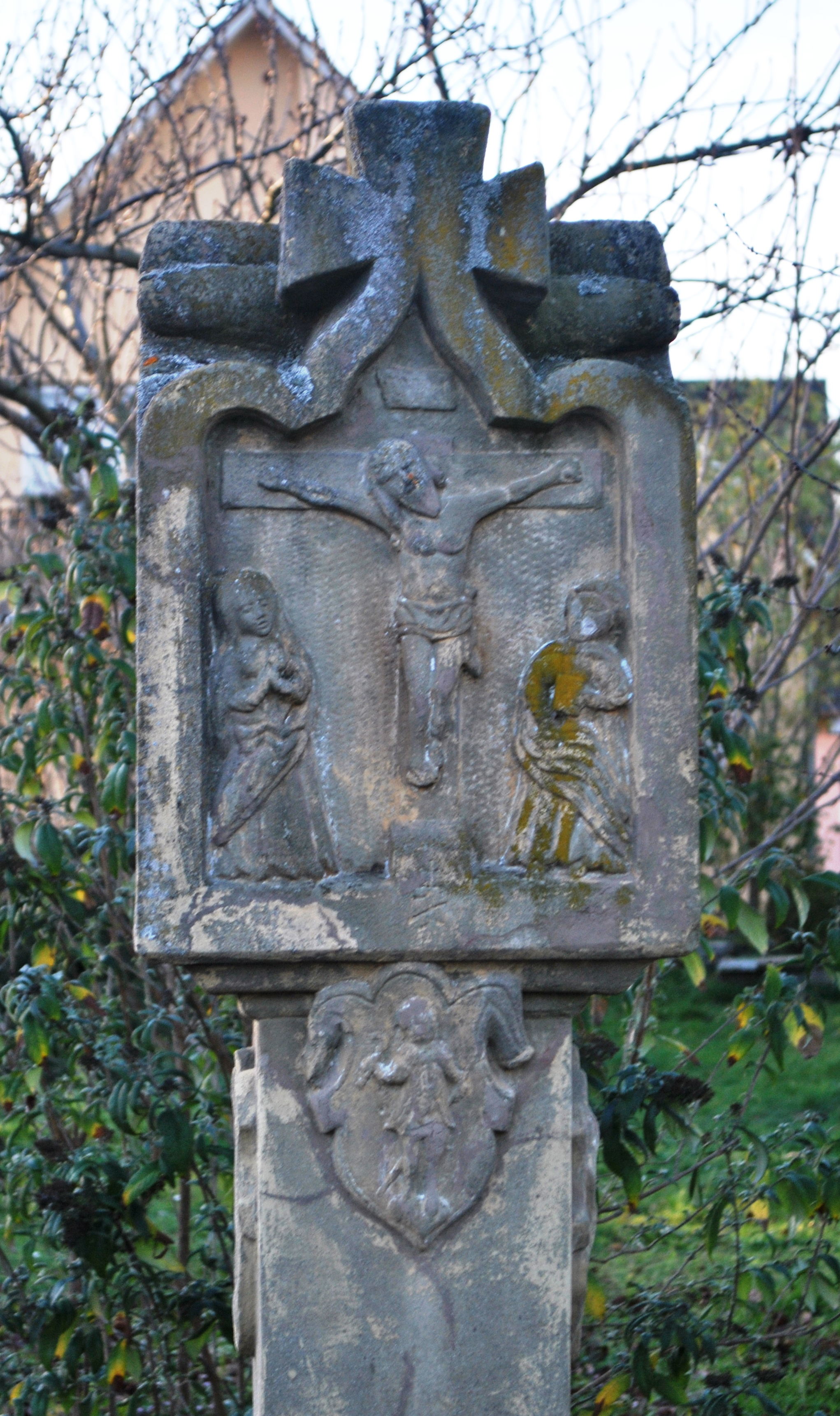 Bildstock mit Kreuzigung und Seitenfiguren, Inschrift auf der Rückseite, bezeichnet 1597